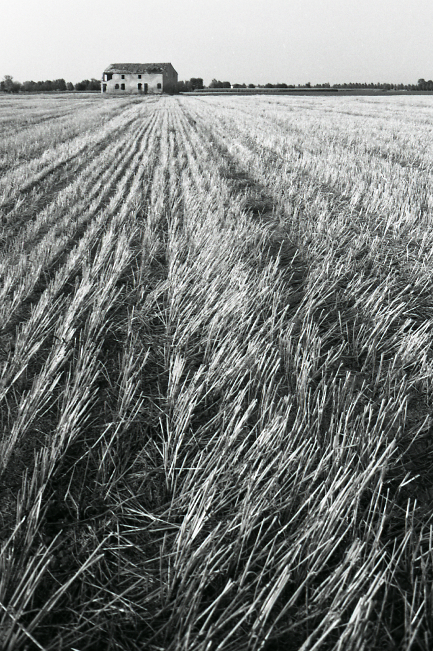 Ferrara. Cassane? Zona inceneritore e parco: paesaggi rurali. Servizio fotografico : Ferrara, 1974 / Paolo Monti. - Strisce: 3, Fotogrammi complessivi: 15 : Negativo b/n, gelatina bromuro d'argento/ pellicola ; 35 mm. - ((Sul portanegativi: N[I]K[MA]T PanF e iscrizione didascalica e documentaria manoscritta a penna rossa "Zona parco e inceneritore (2-16)". - Occasione: Campagna di rilevamento del centro storico. - (1950-1978), presso Archivio Paolo Monti. - Fonte: Agenda di Paolo Monti: Leica 1501-3000 Controllo numerazione